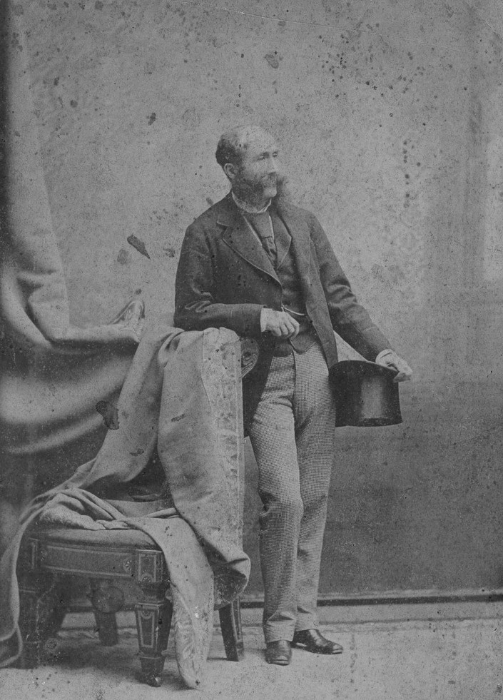 El presidente de la República del Ecuador, Antonio Flores Jijón (1883)